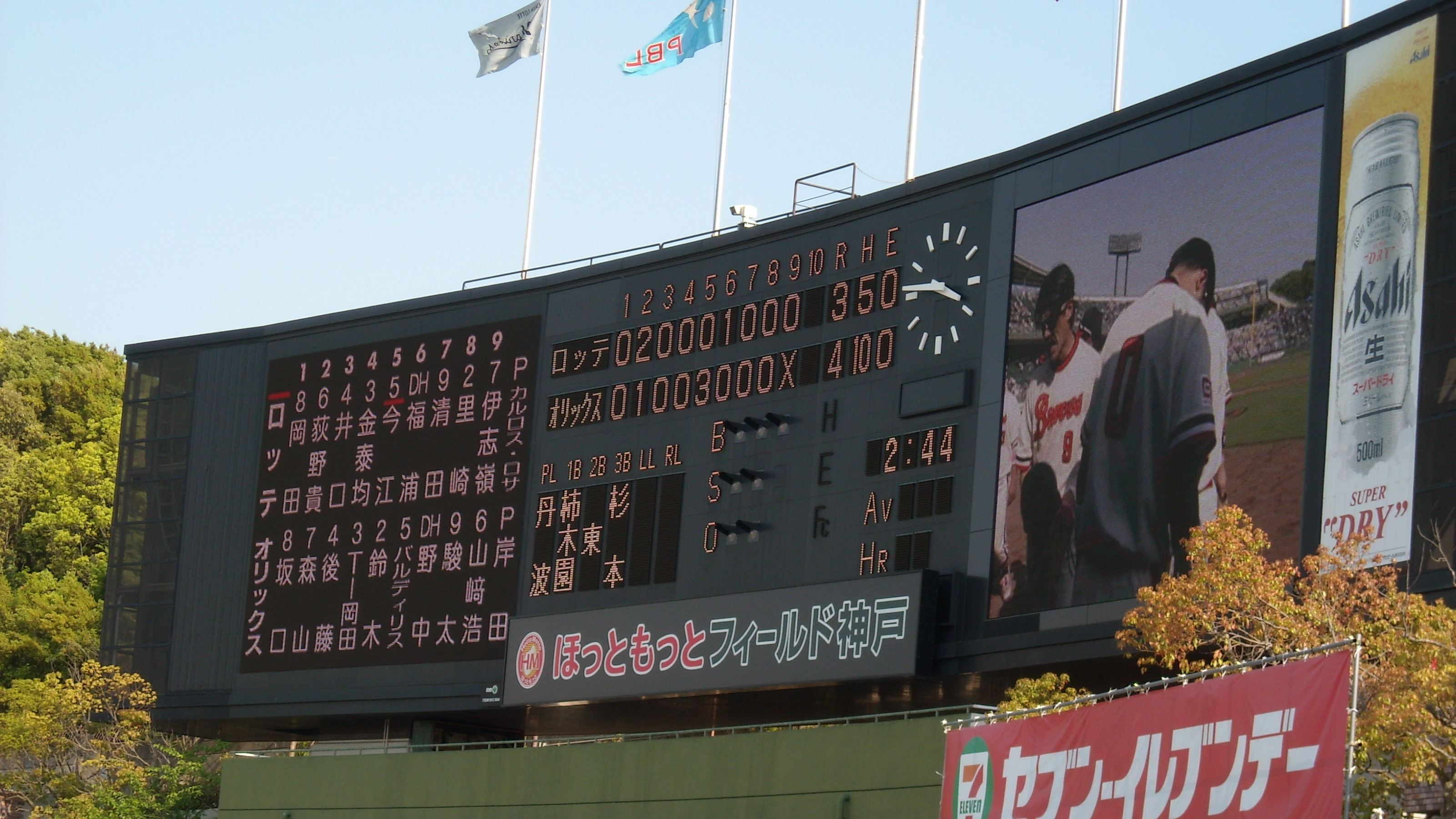 "ほっともっとフィールド神戸"(神戸総合運動公園 野球場)スコアボード